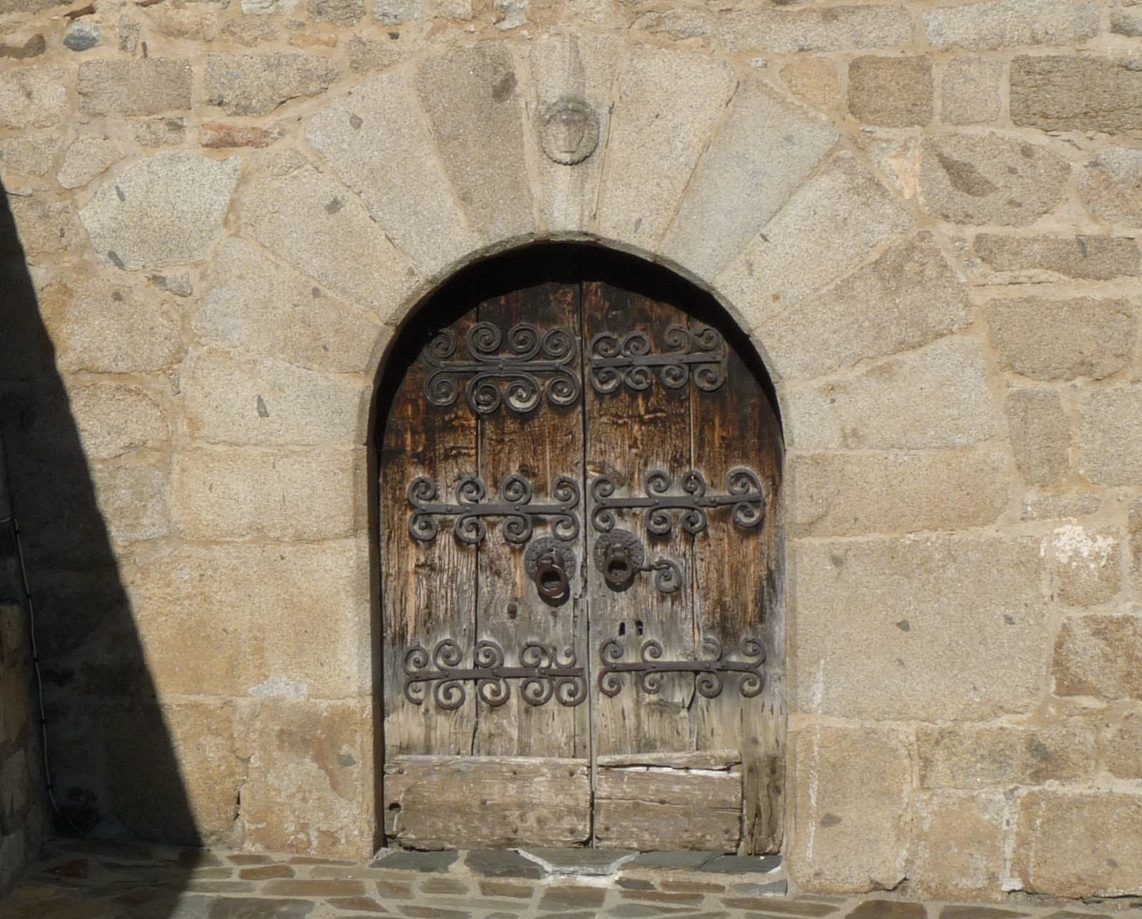 Eglise d'Ayguatébia, Pyrénées-Orientales, France